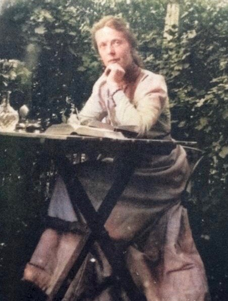 Die Verfasserin Anna Schieber in der Dichterklause.